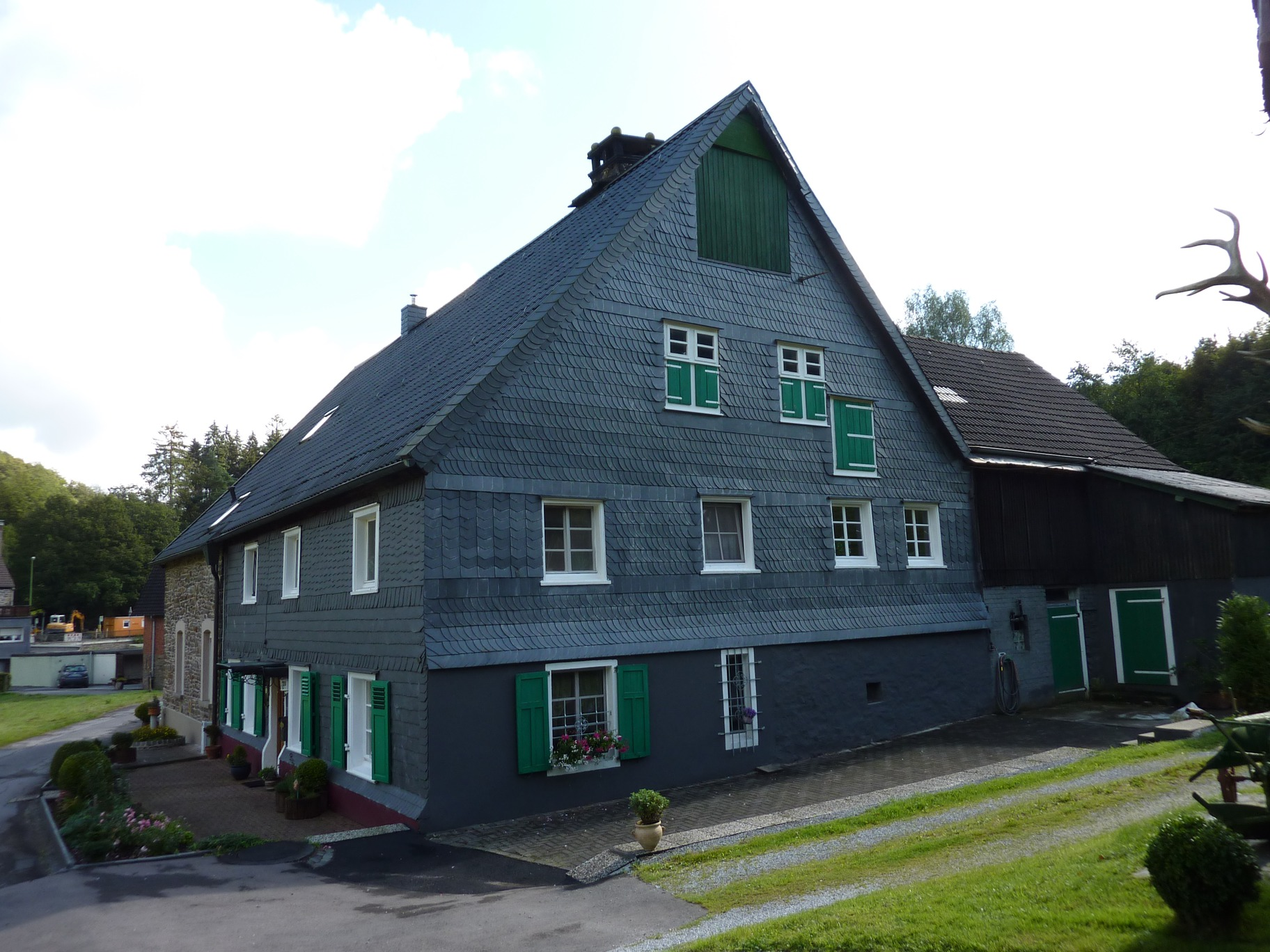 Hof Wittenstein an der Heilenbecke in EnnepetalThis is a photograph of an architectural monument., no. 0